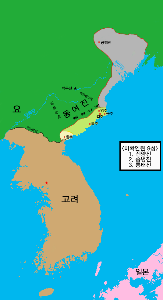 학설들에 대한 동북 9성의 추정도.